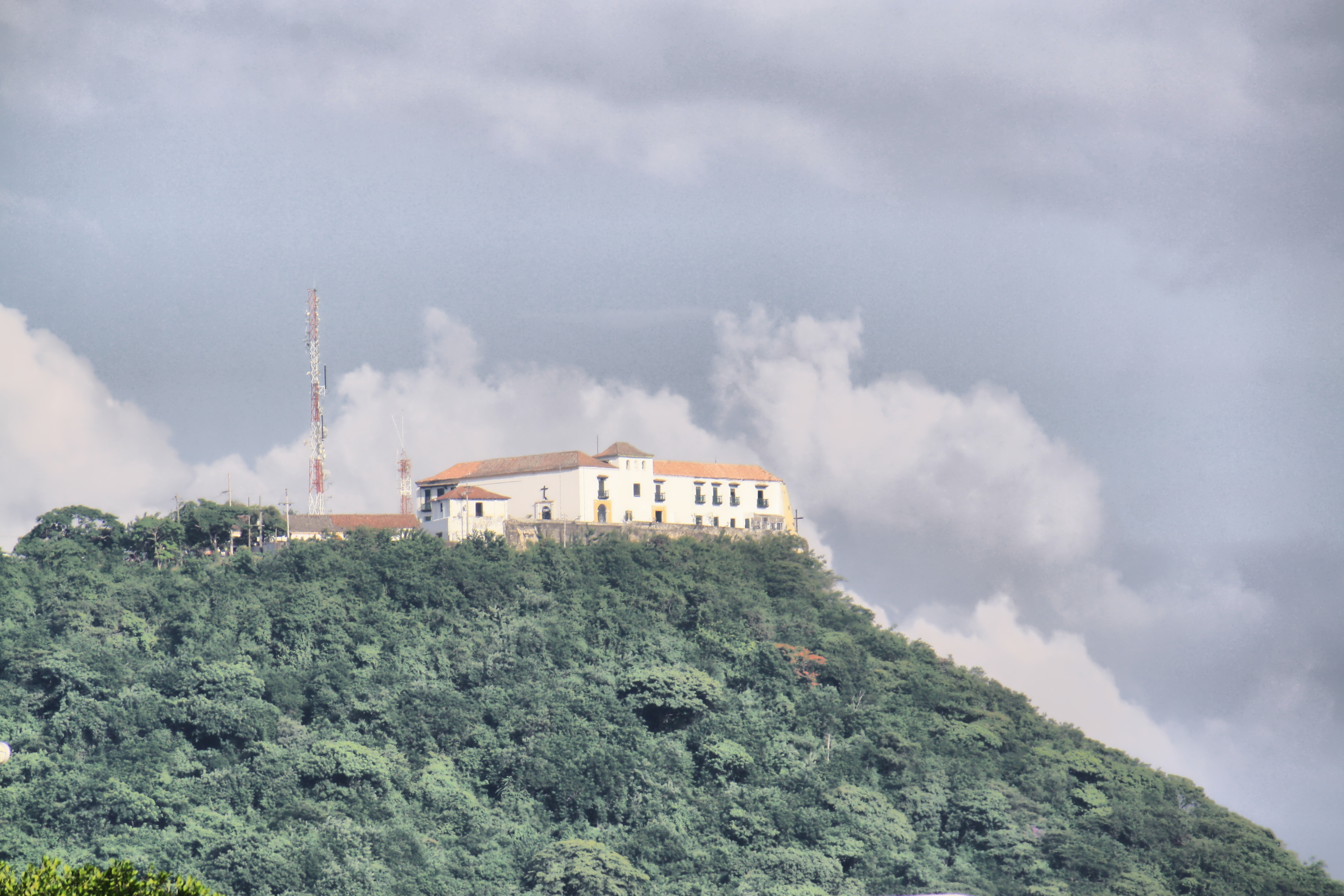 Iglesia y Convento de Santa Cruz de La Popa